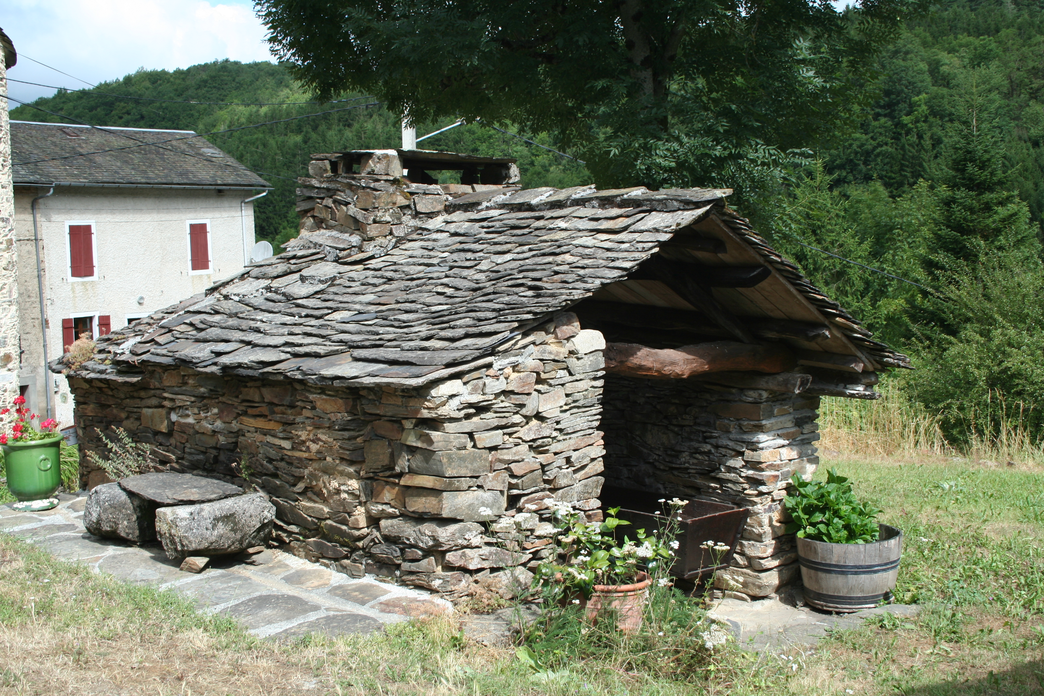 Gijounet (Tarn) - four.